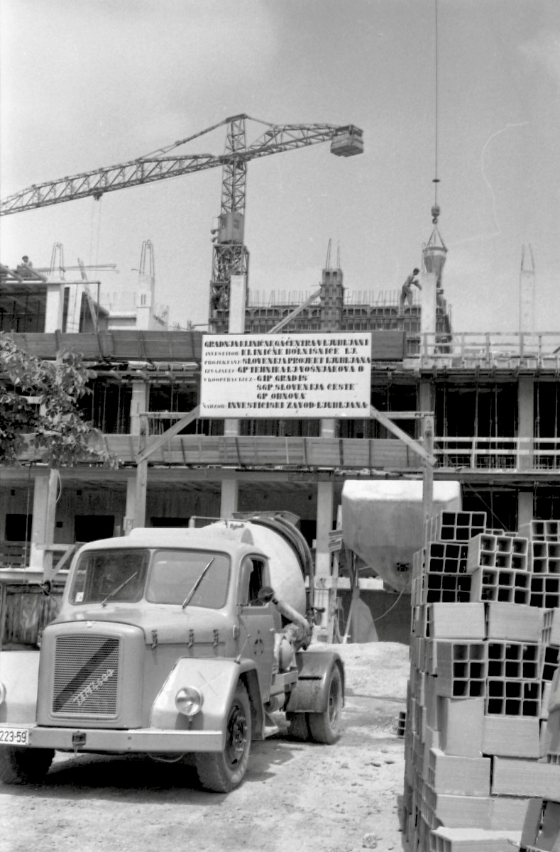 Gradnja kliničnega centra v polnem teku.